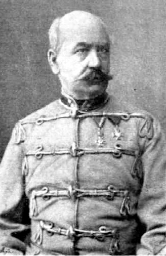 Görgey Kornél (1819–1897) 48-as honvéd alezredes, magyar királyi honvéd altábornagy portréja